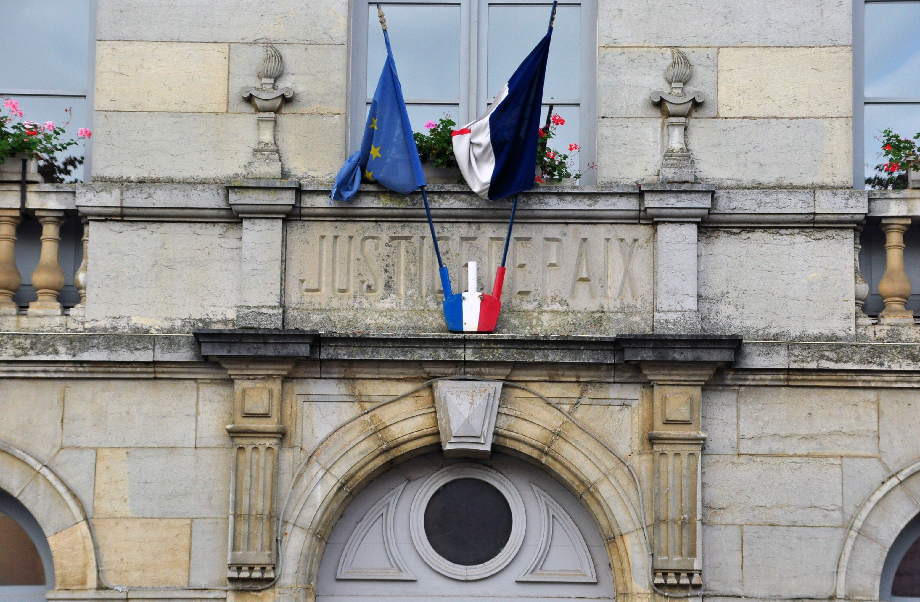 Noroy le Bourg - Ecole, mairie, justice de paix